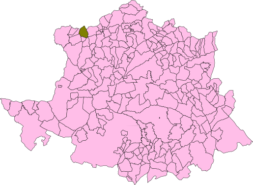 Loko de la municipo de Acebo en sia provinco.